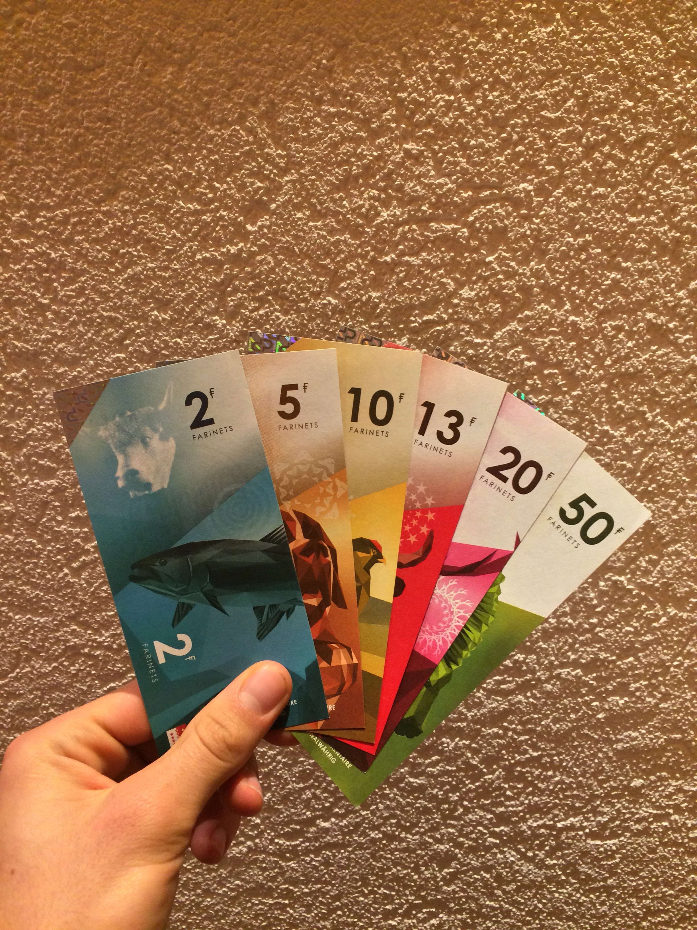 La monnaie régionale valaisanne "Le Farinet".